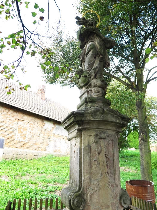 Socha svatého Jana Nepomuckého, Horní Bousov.